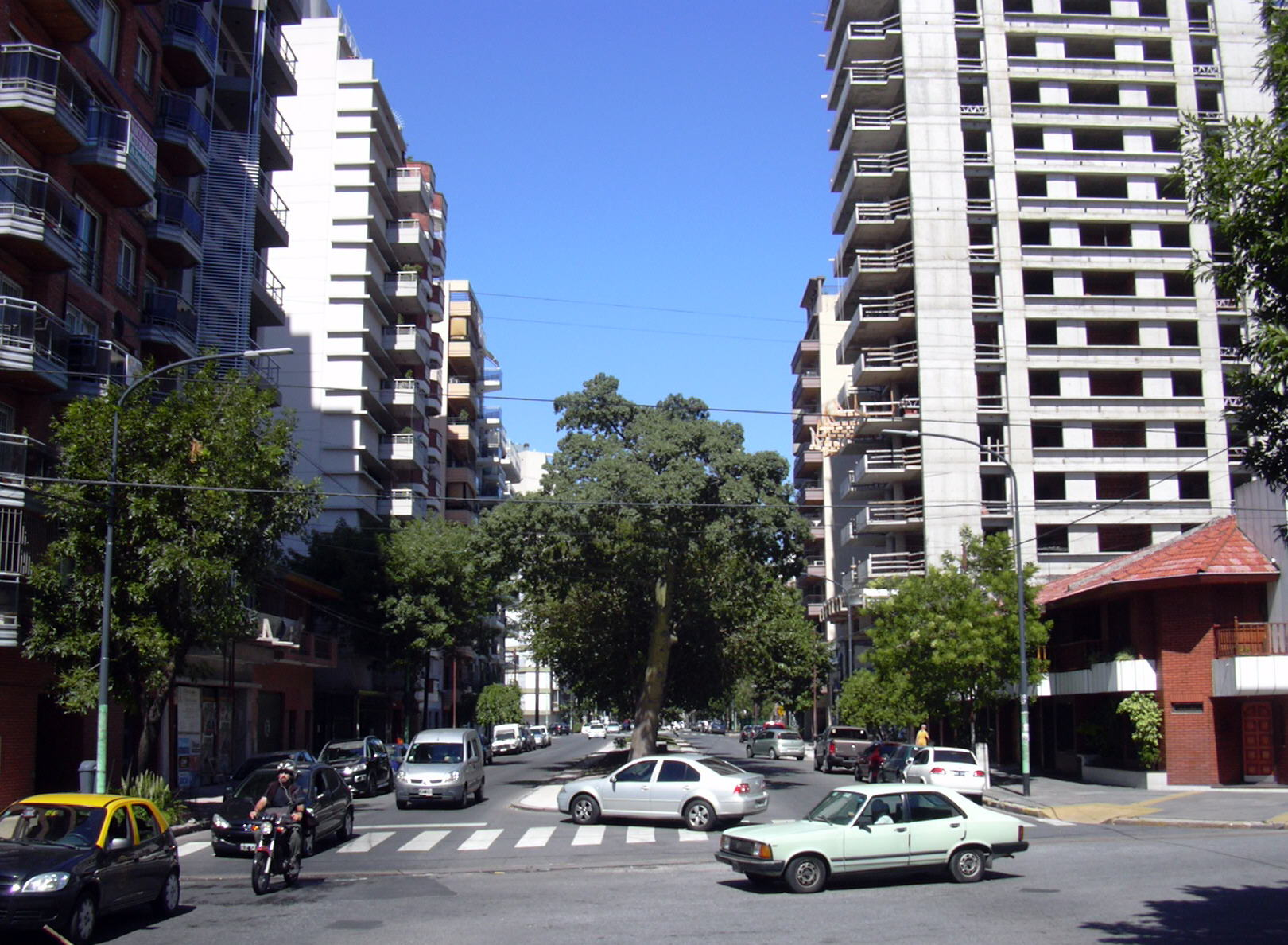 Boulevard Ramón L. Falcón al 5700, en el sector conocido como "Villa Luro Hollywood"